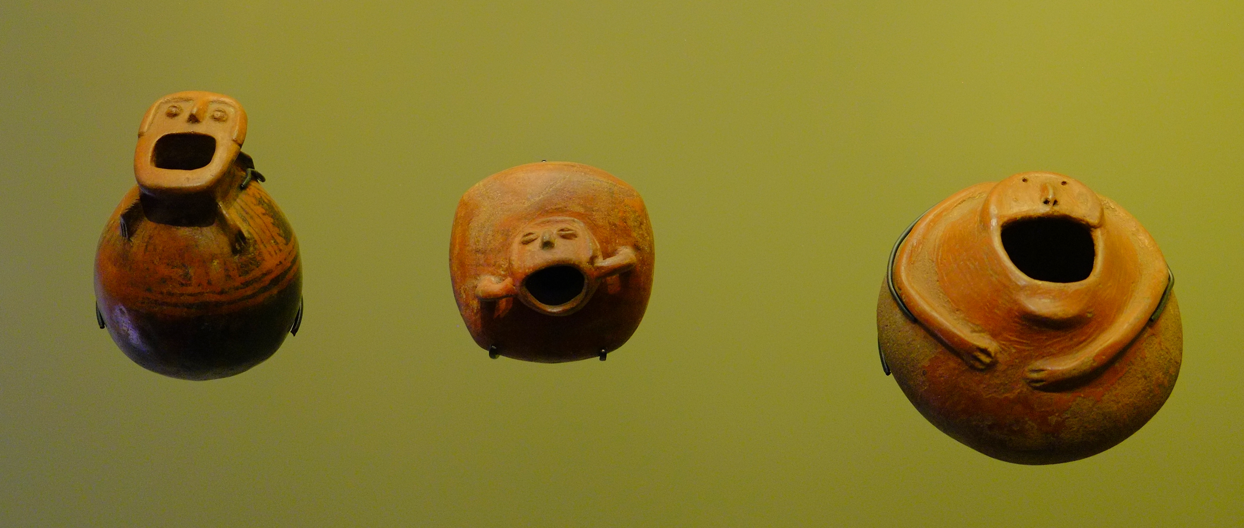 Museo Del Oro, Bogota